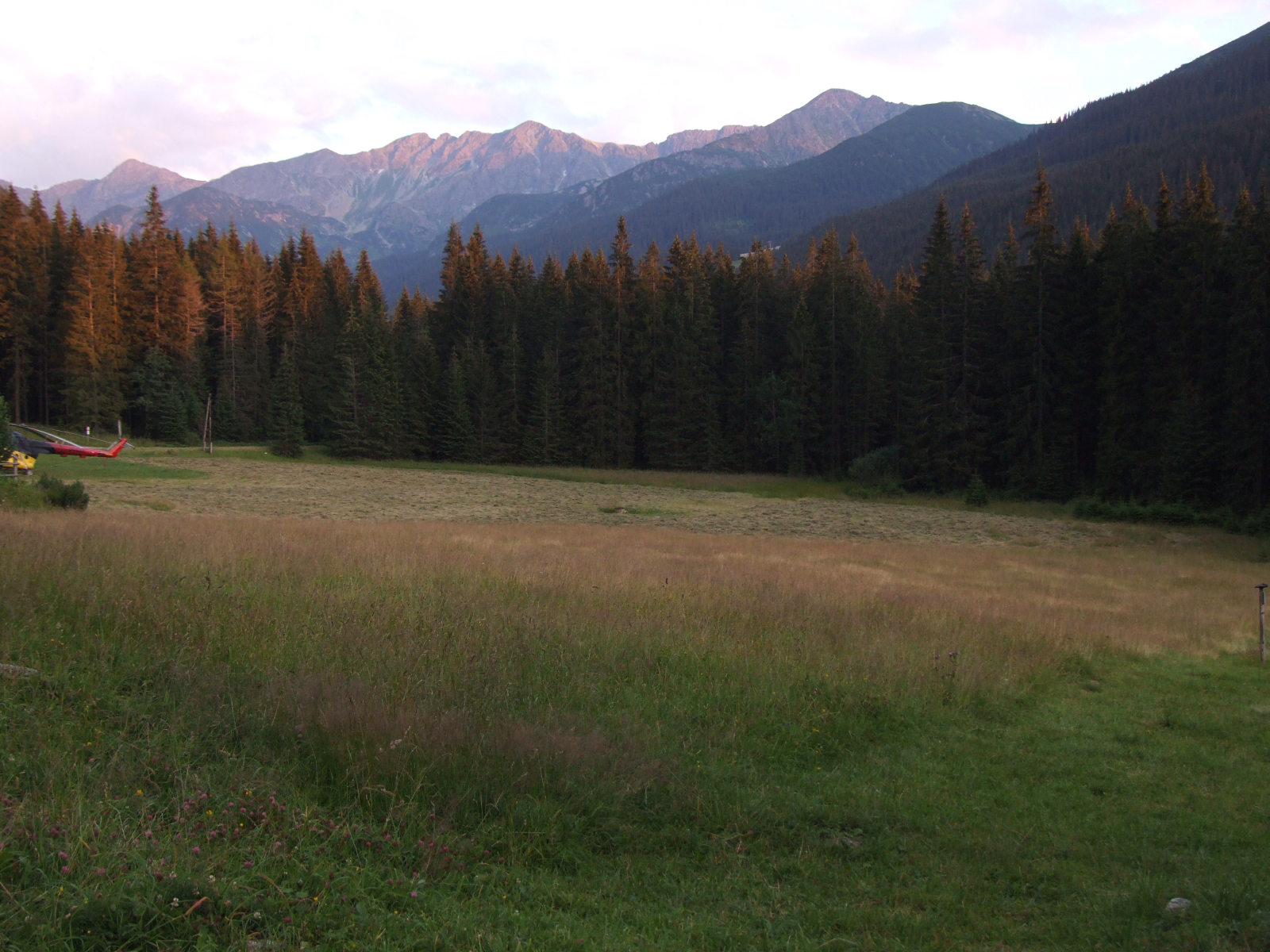 Zwierówka (Zuberec, West Tatra Mountains)